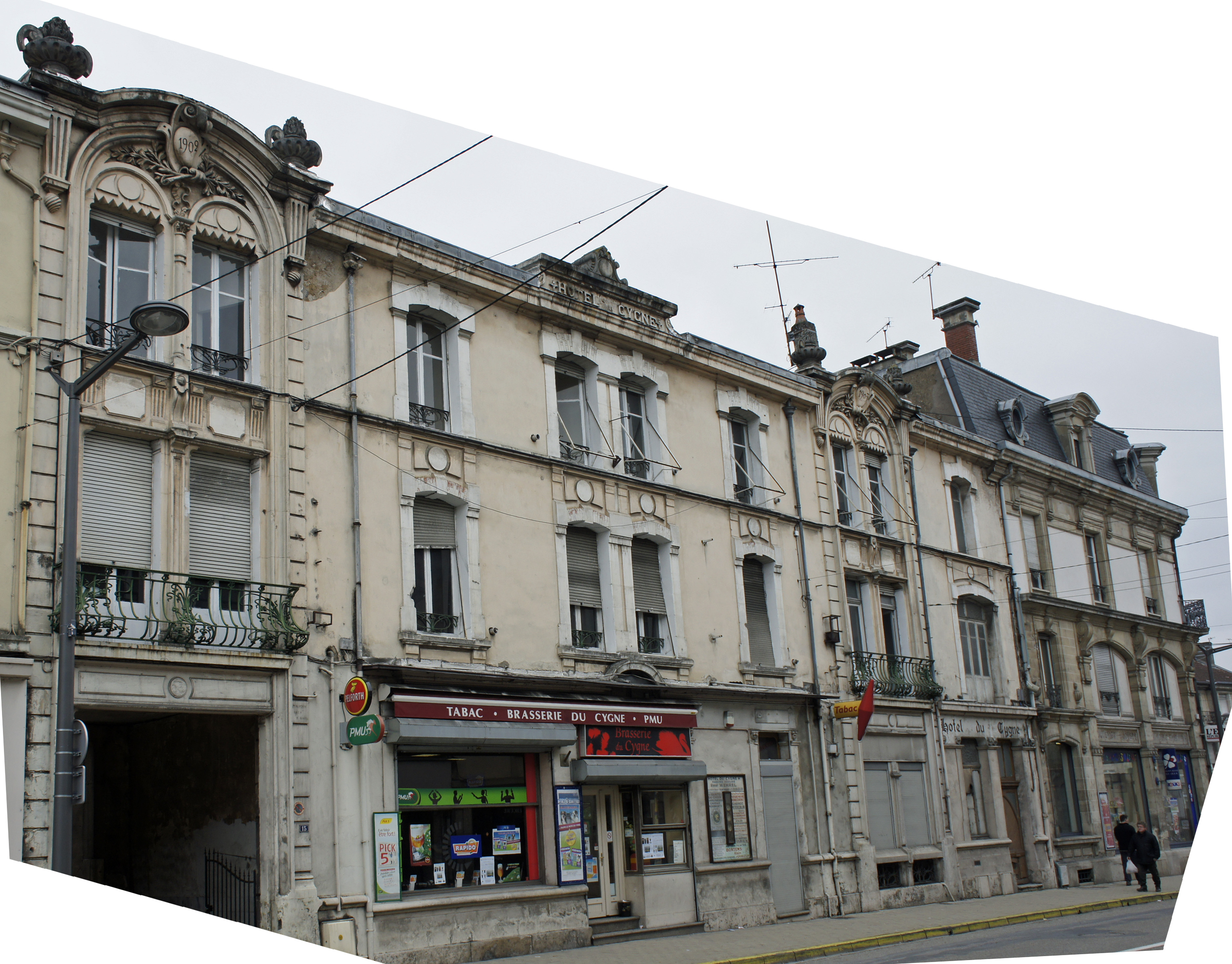 Hôtel_du_Cygne, construction du XVIe siècle.